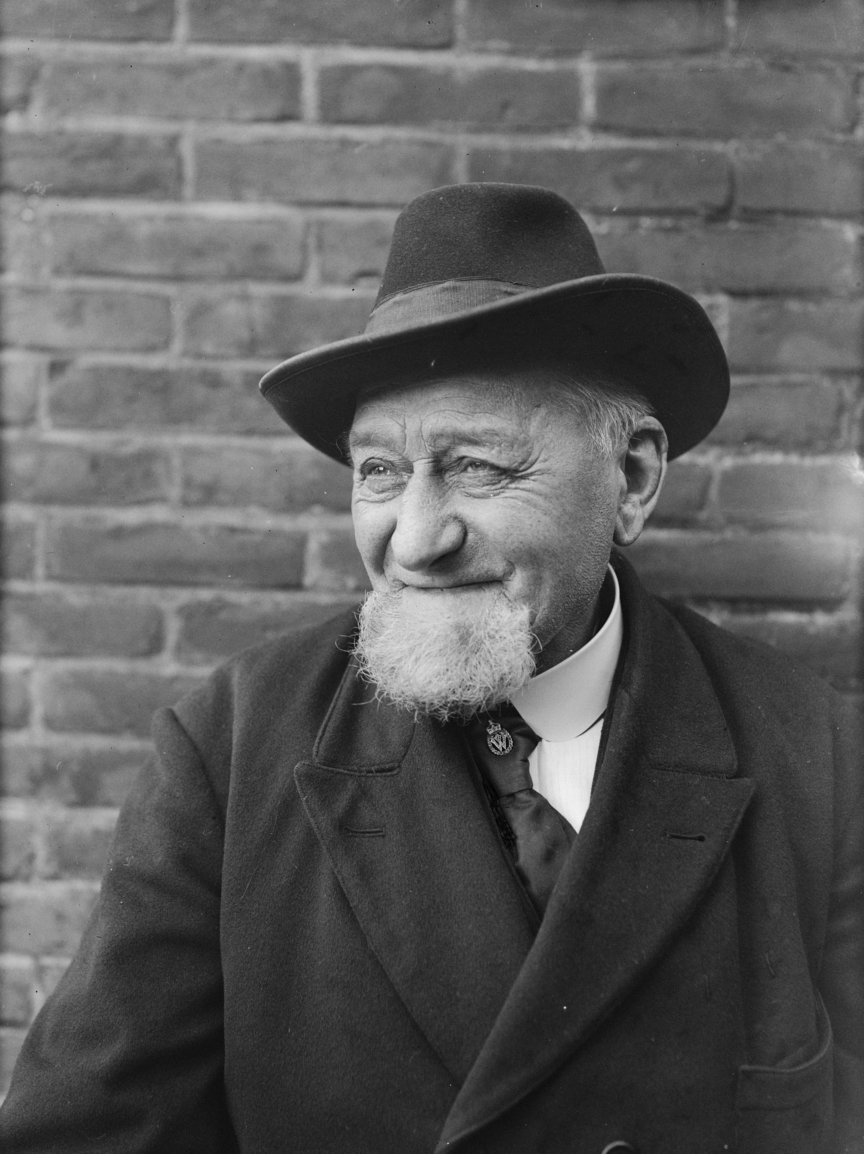 Portret van bejaarde Dorus Rijkers, mogelijk bij zijn woning Den Helder 1927 Catalogusnummer: RAA003012816 Collectie Regionaal Archief Alkmaar